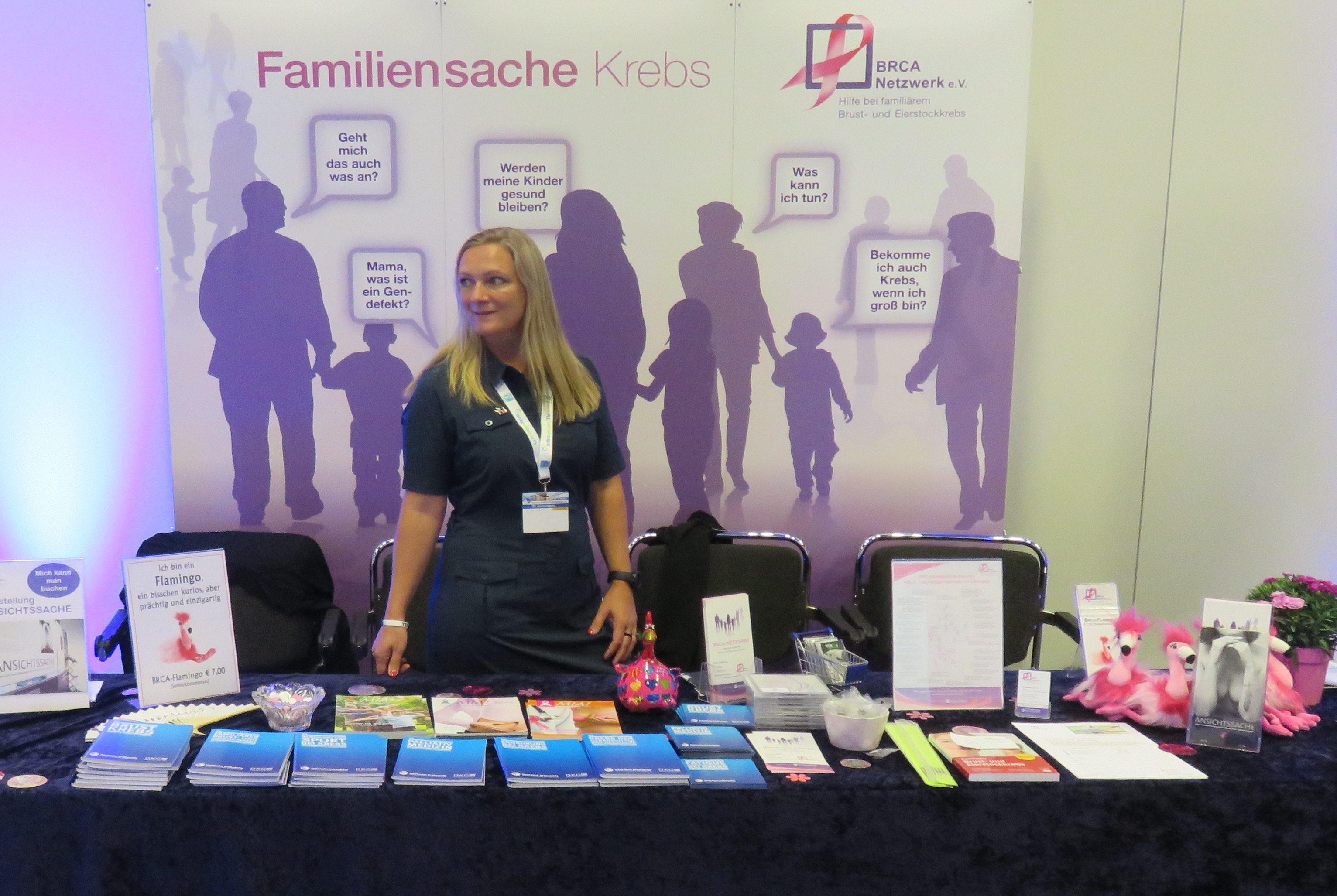 Infostand des BRCA Netzwerks e.V. während der 39. Jahrestagung der Deutschen Gesellschaft für Senologie, Berlin, Juni 2019